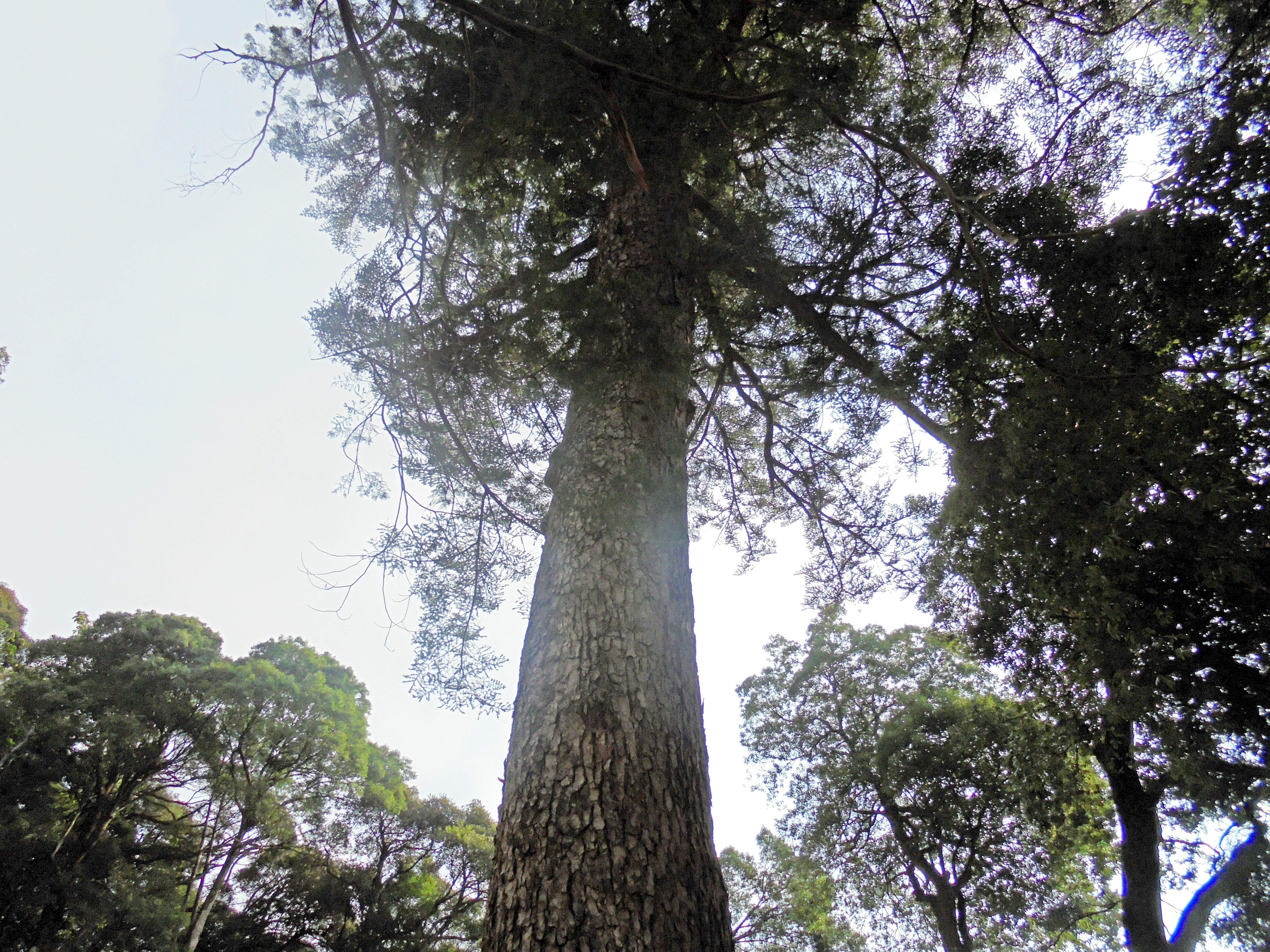 兵庫県指定の文化財の大モミ